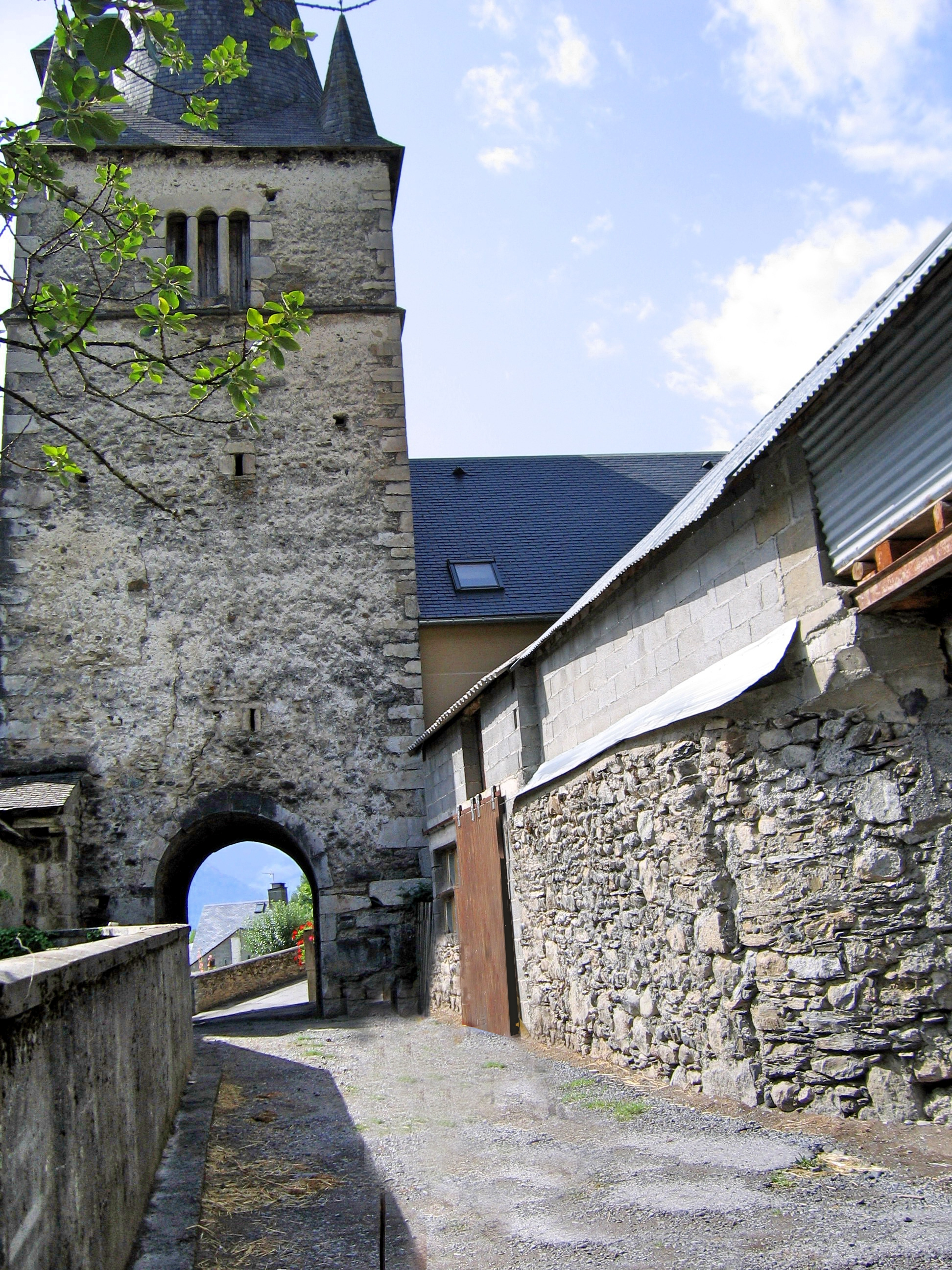 Ancizan dans les Hautes-Pyrénées Occitanie